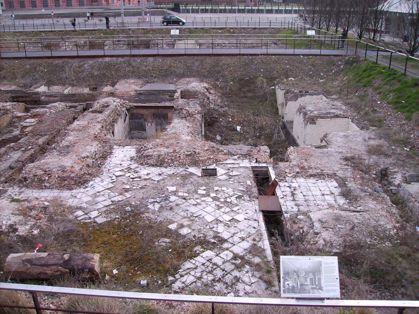 Freigelegte Kellerreste des Berliner Stadtschlosses